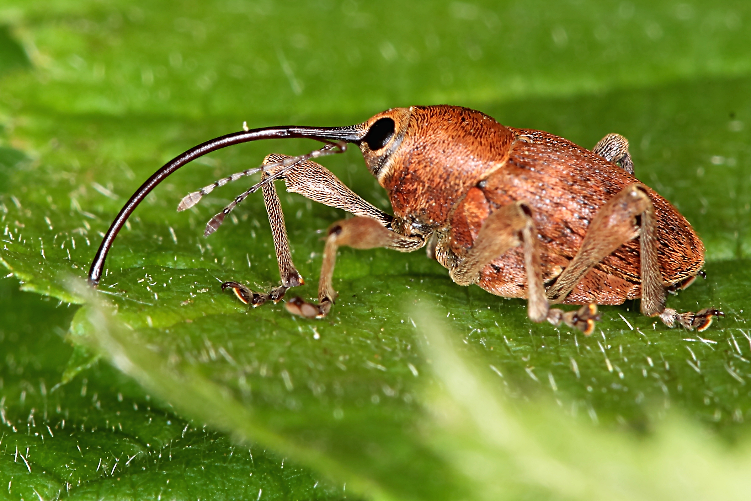 Haselnussbohrer